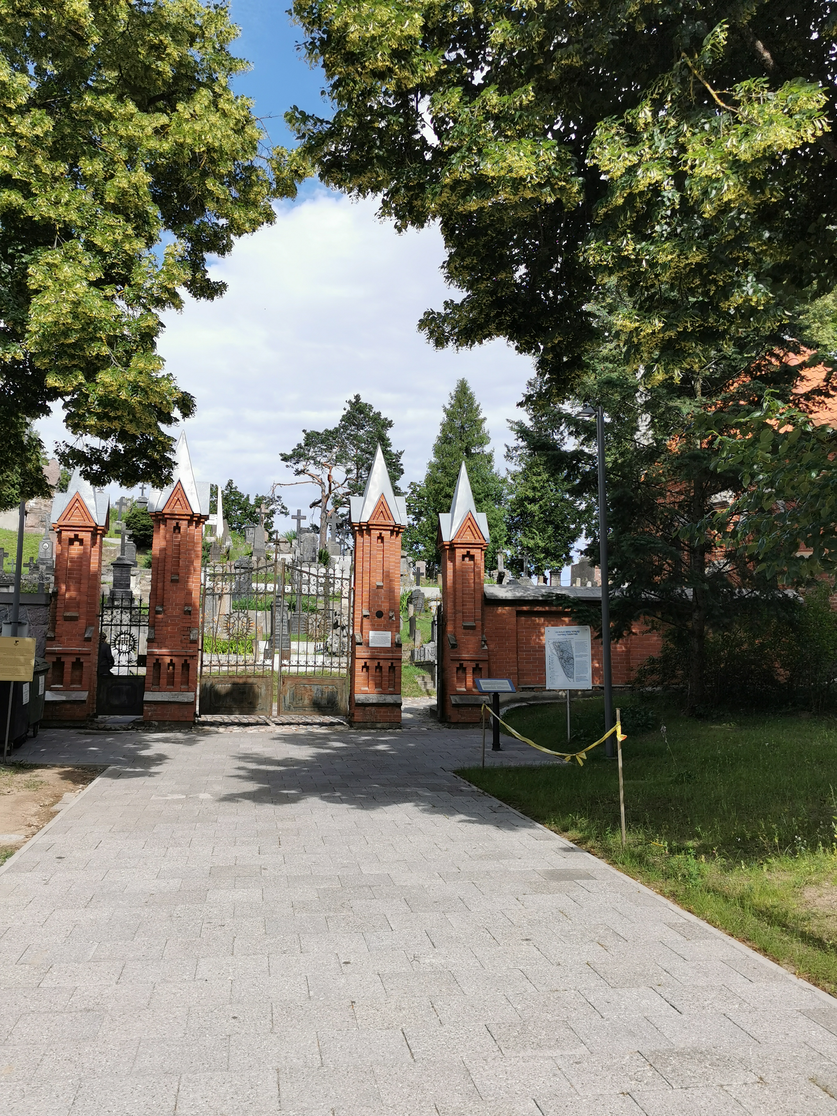 Rasų kapinių pagrindiniai vartai